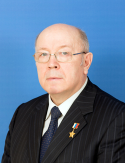 Александр Алексеевич Чекалин (род.1947) — российский государственный деятель, генерал-полковник милиции